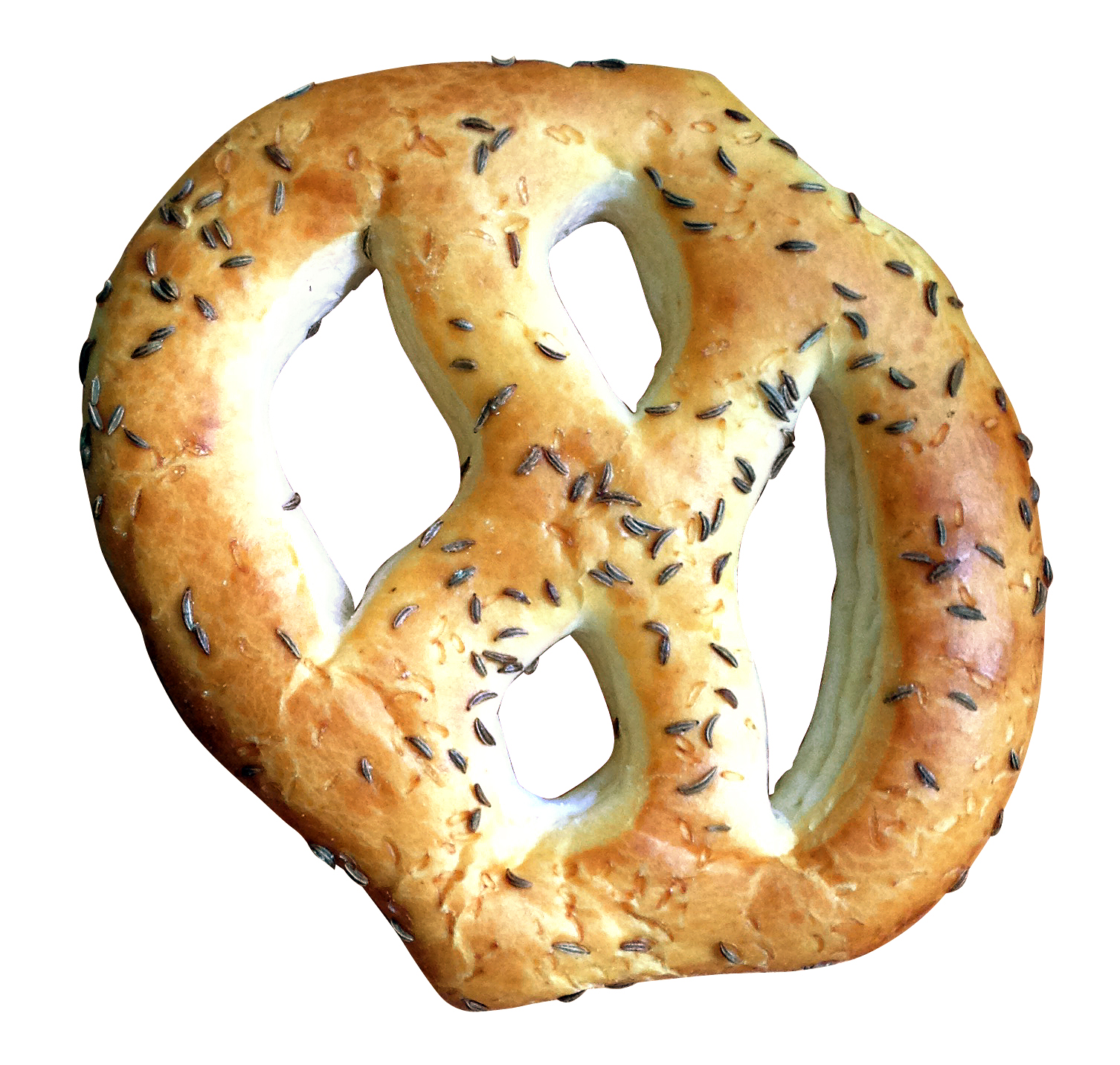 Basler Faschtewaije, auch Faschtewaie.